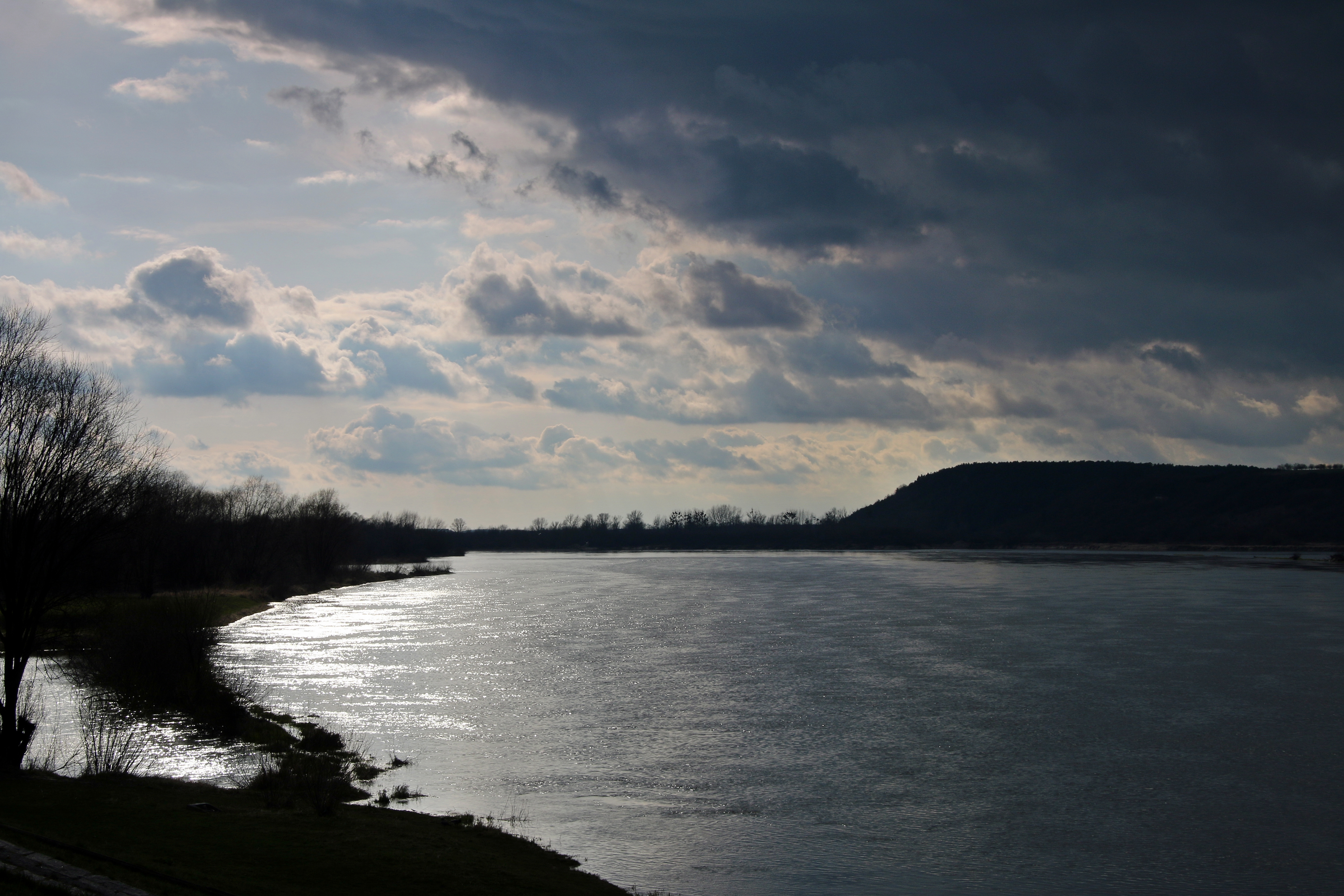 Specjalny obszar ochrony siedlisk Przełom Wisły w Małopolsce. This is a photography of Natura 2000 protected area with ID PLH060045